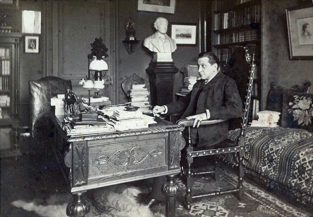 Coppée chez lui